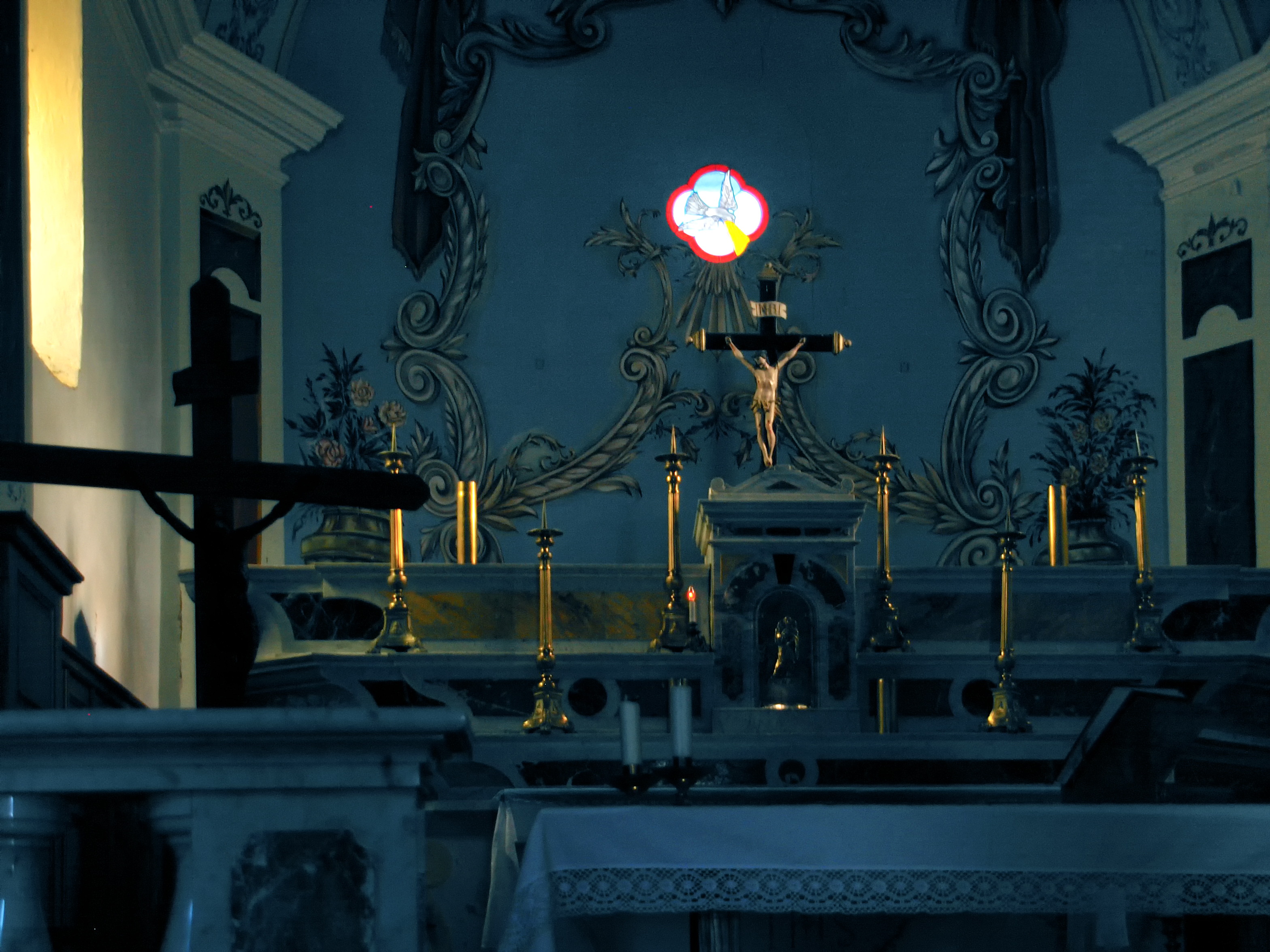 Olmeta-di-Tuda, Nebbio (Haute-Corse) - Intérieur de l'église paroissiale Sainte-Marie-de-l'Assomption dite "Santa Maria"